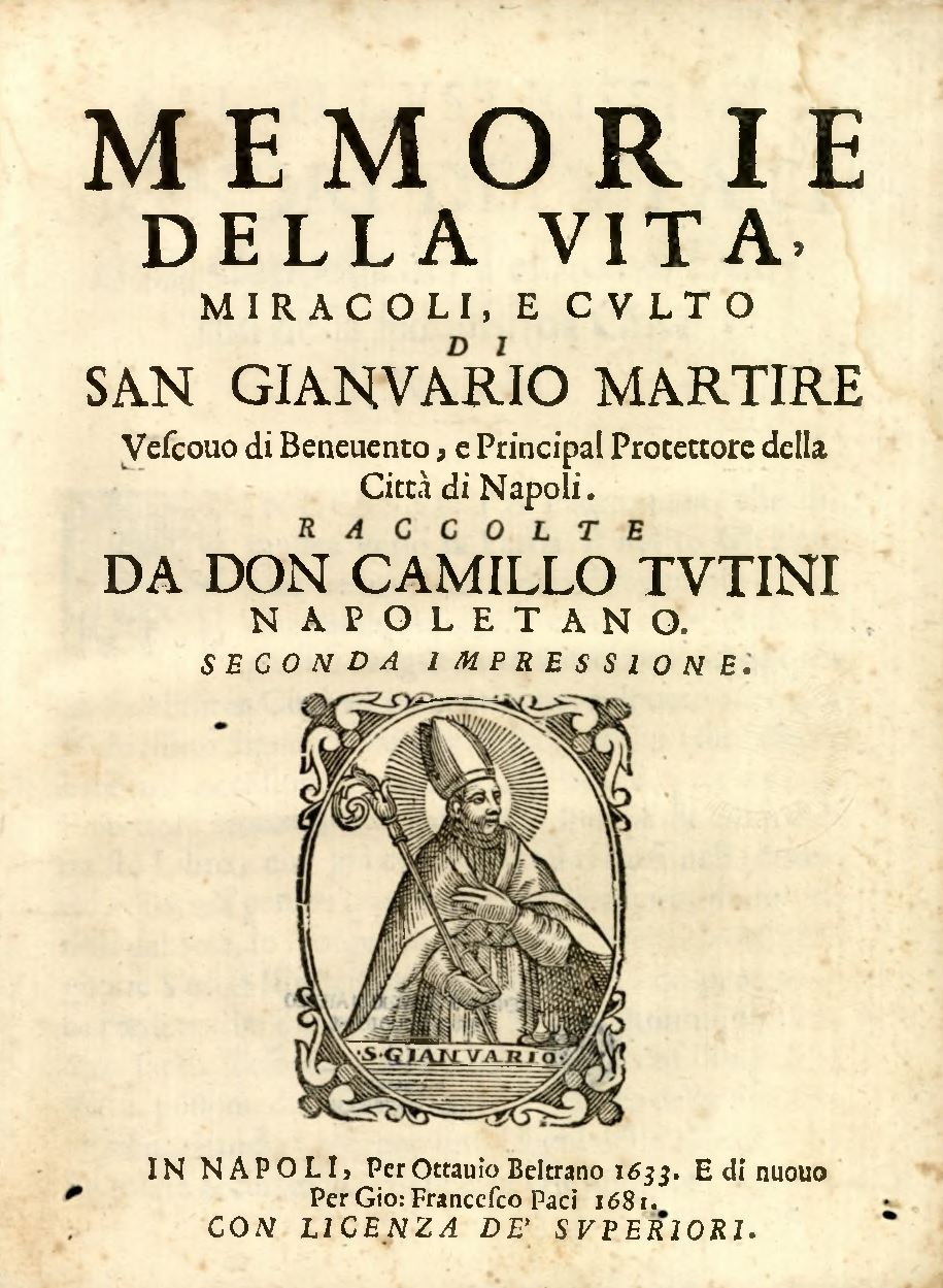 Memorie della vita, miracoli, e culto di San Gianuario martire vescovo di Benevento, e principal protettore della città di Napoli. Raccolte da don Camillo Tutini, In Napoli per Ottauio Beltrano, 1633. E di nuovo Per Gio: Francesco Paci 1681. CON LICENZA DE' SUPERIORI.